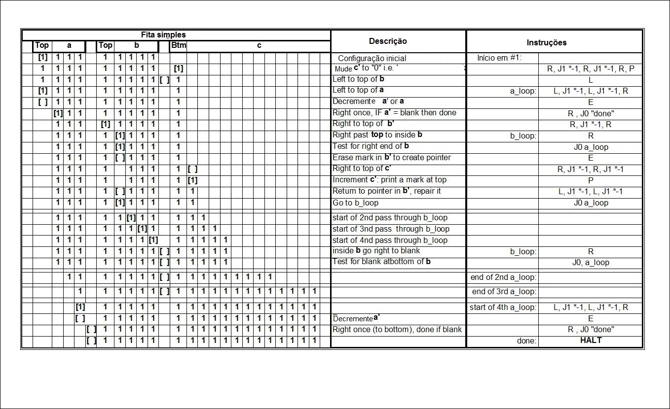 Exemplo de multiplicação utilizando máquina de Post-Turing.